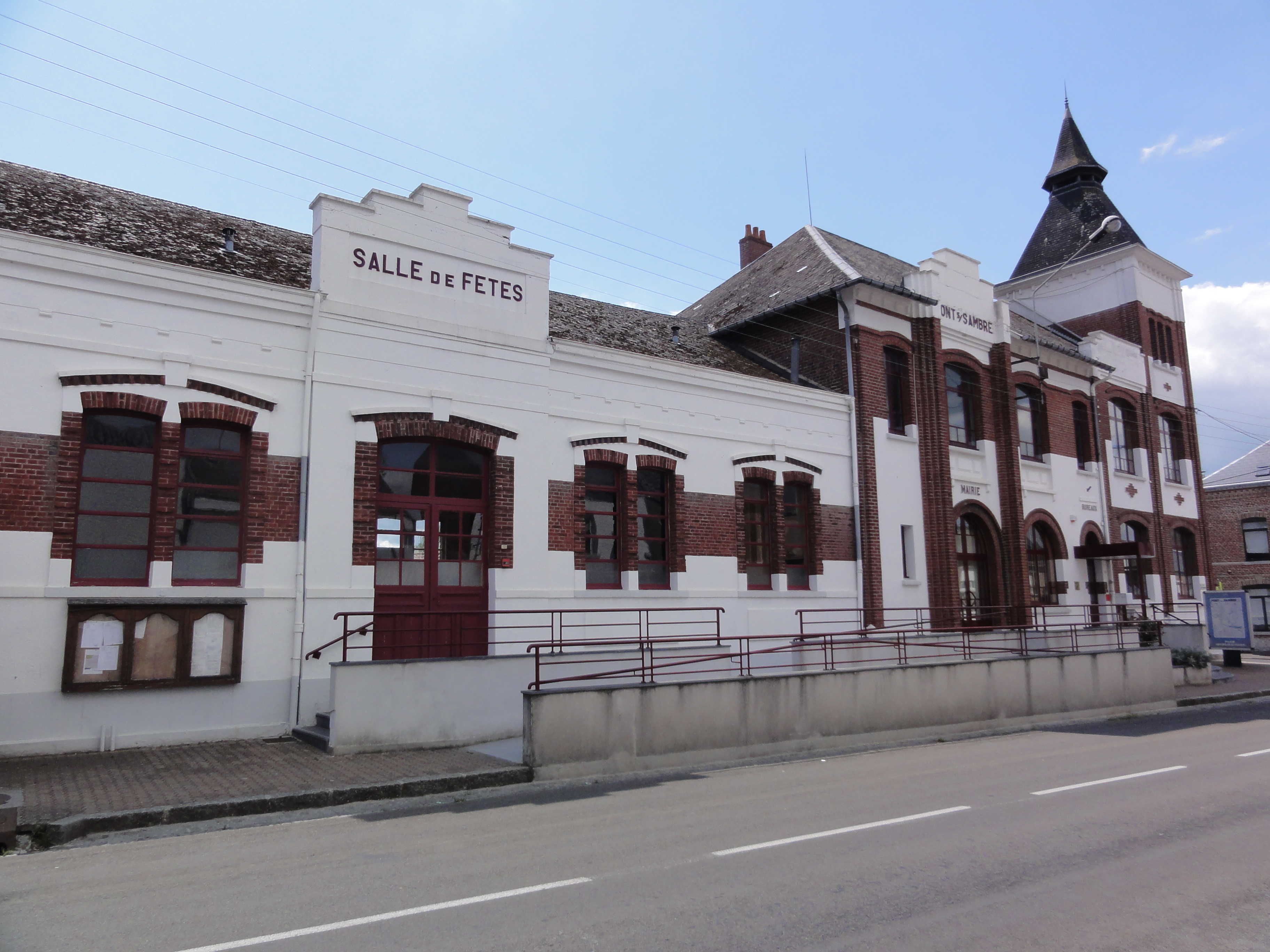 Pont-sur-Sambre (Nord, Fr) Salles des fêtes, mairie